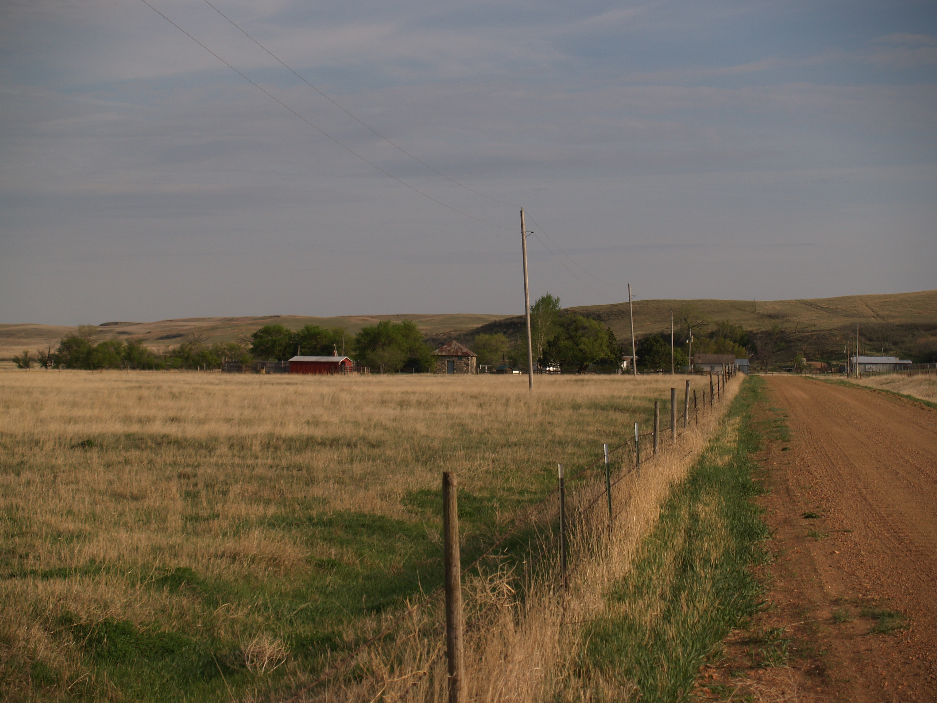 Schafer, North Dakota